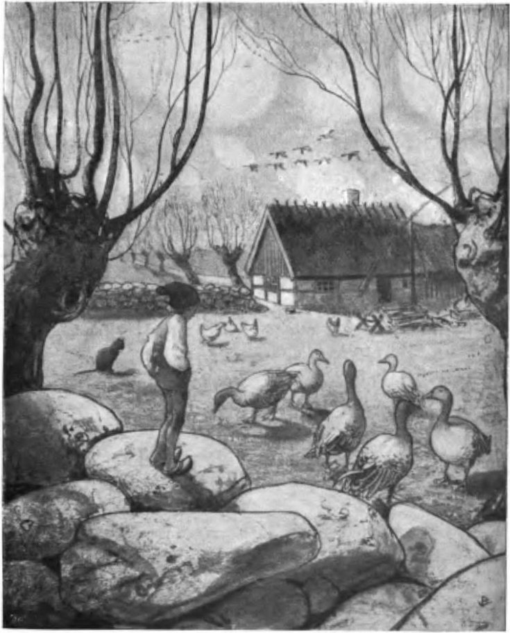 Illustration by John Bauer from Nils Holgerssons underbara resa genom Sverige by Selma Lagerlöf.